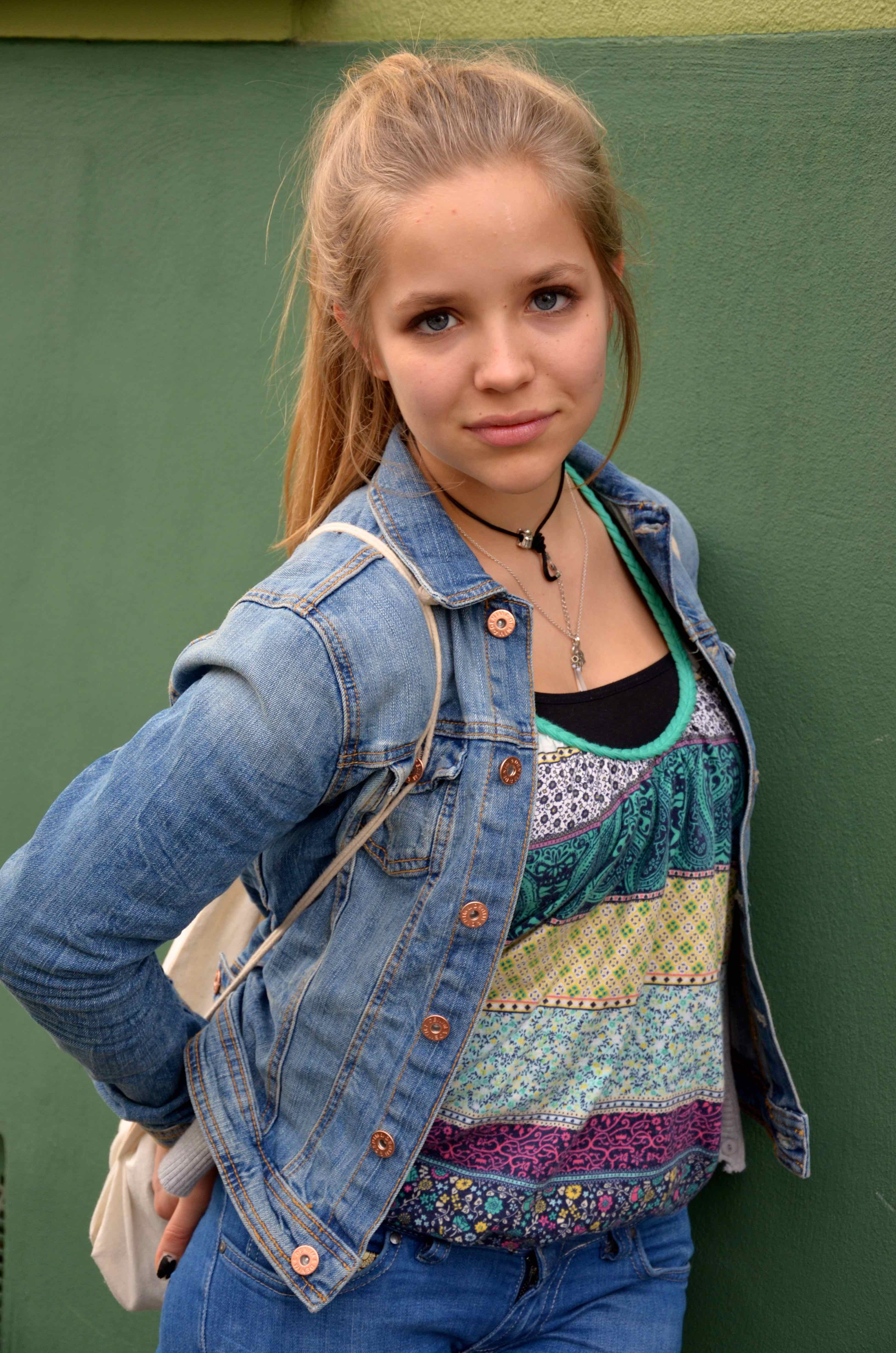 Sommer 2015